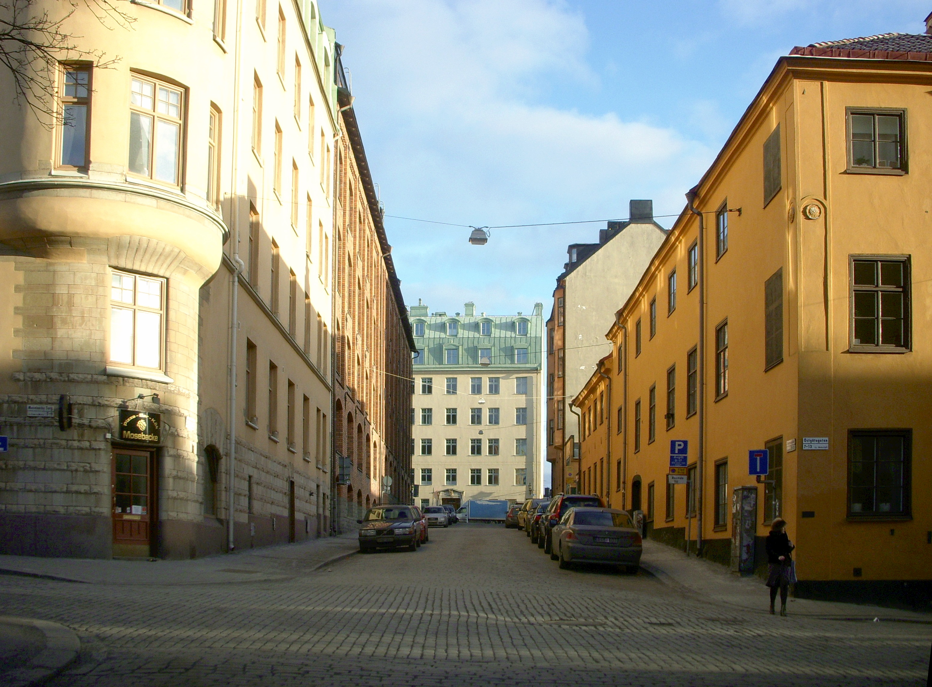 Svartensgatan på Södermalm i Stockholm, vy österut med "Skandalhuset" i fonden. Fastigheten Häckelfjäll 3 ligger till höger